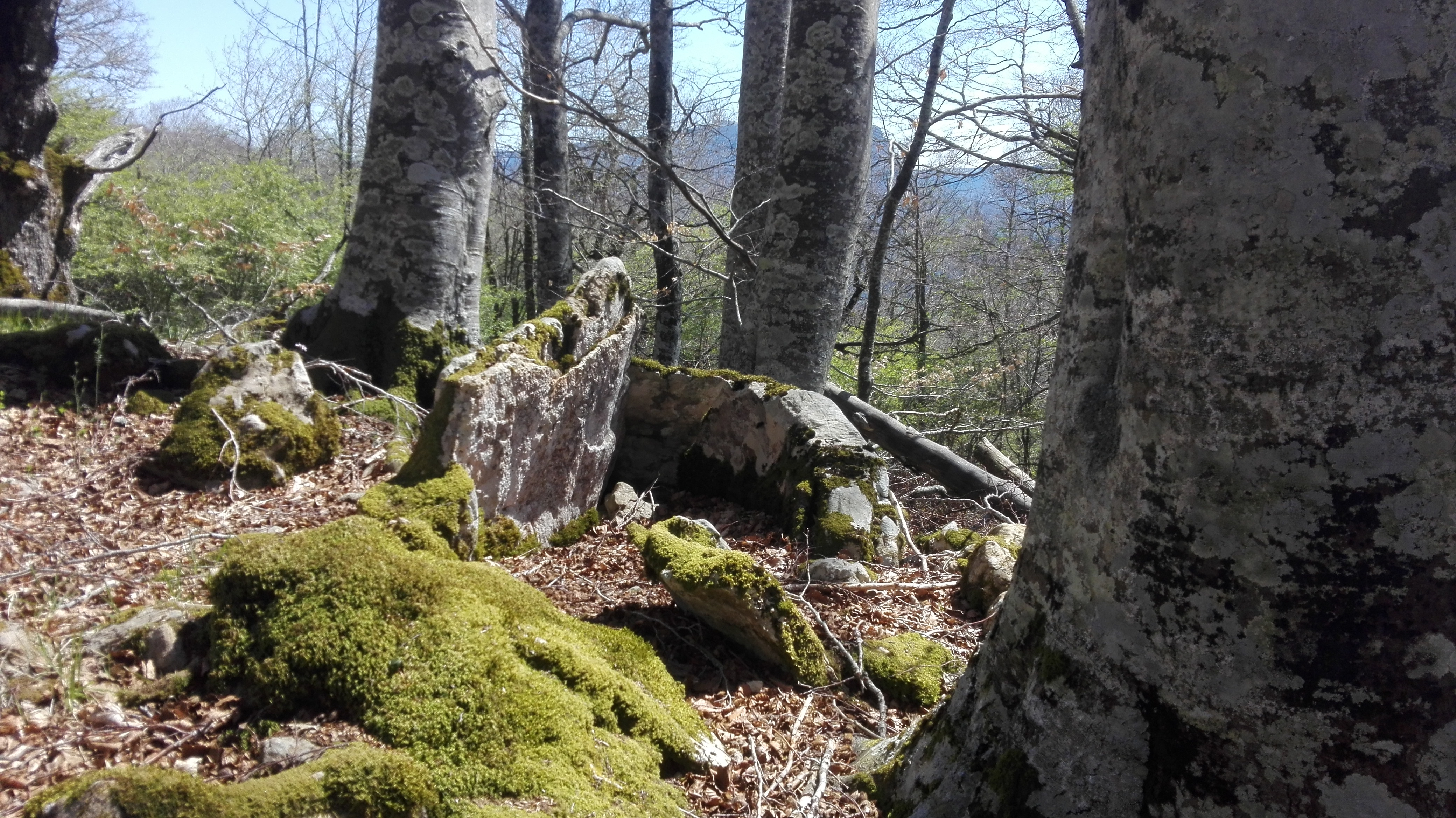 Arbizuko basoan dagoen trikuharria